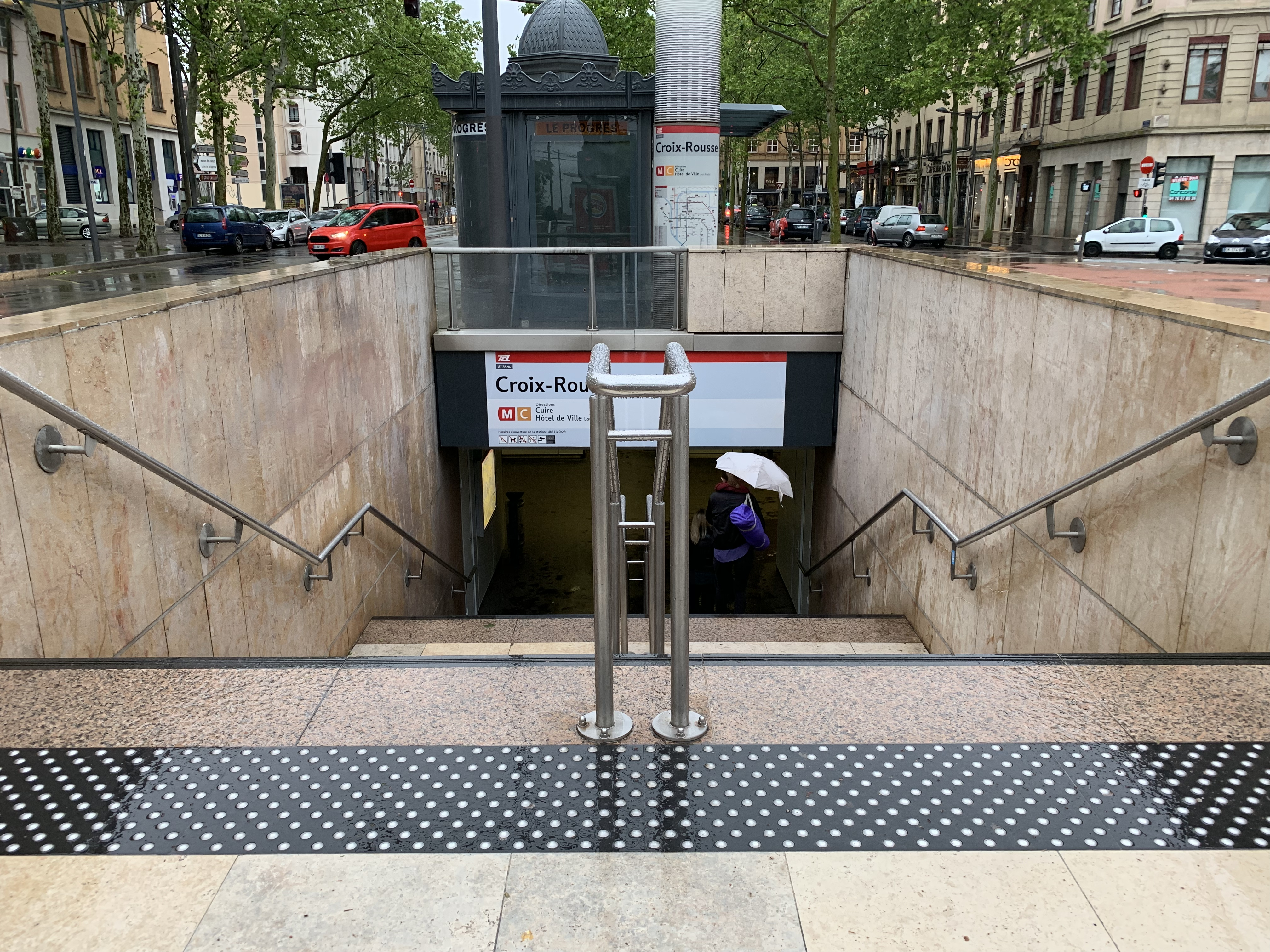 Accès à la station de métro Croix-Rousse (Lyon) en mai 2019.